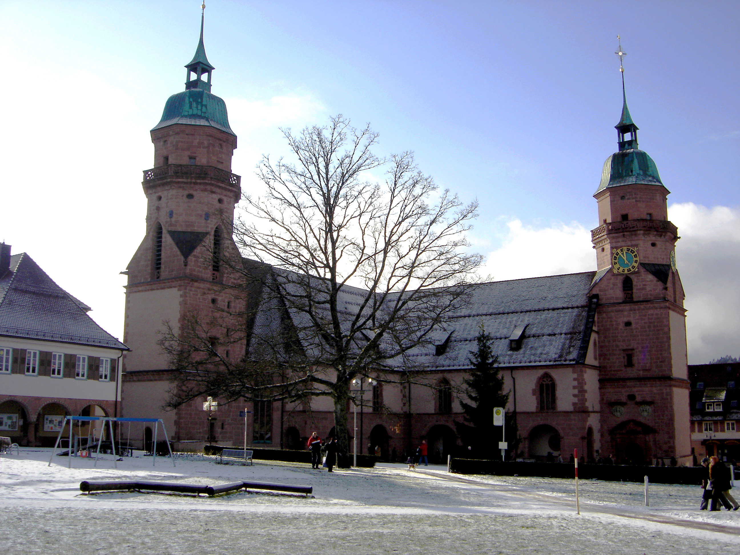 Der Marktplatz von Freudenstadt mit Kirche/ The main square of Freudenstadt, Germany